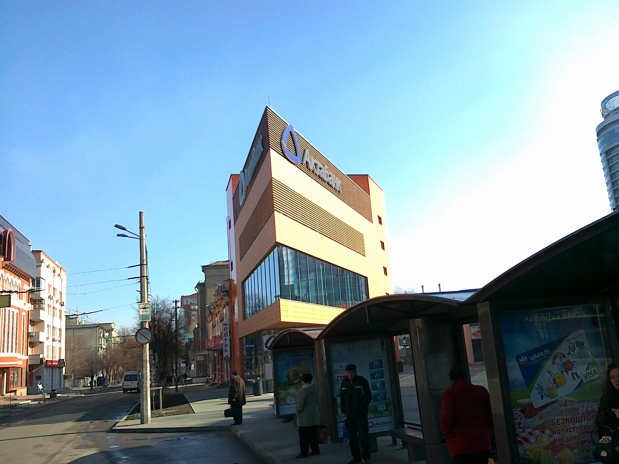 "Клин" / "Wedge"